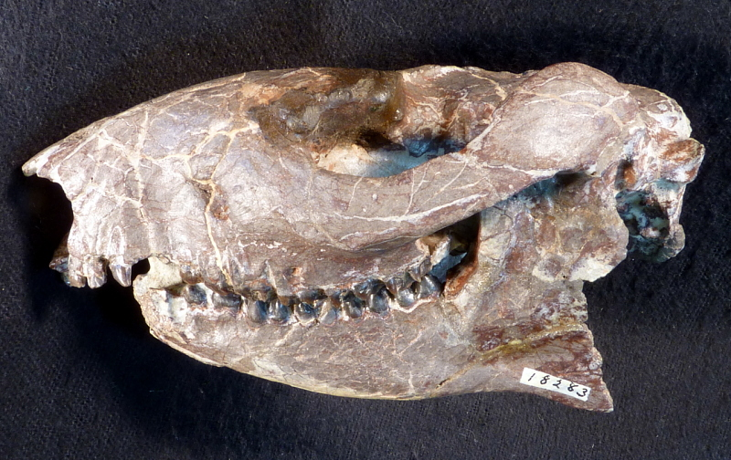 Meniscotherium robustum Thorpe, 1934 1